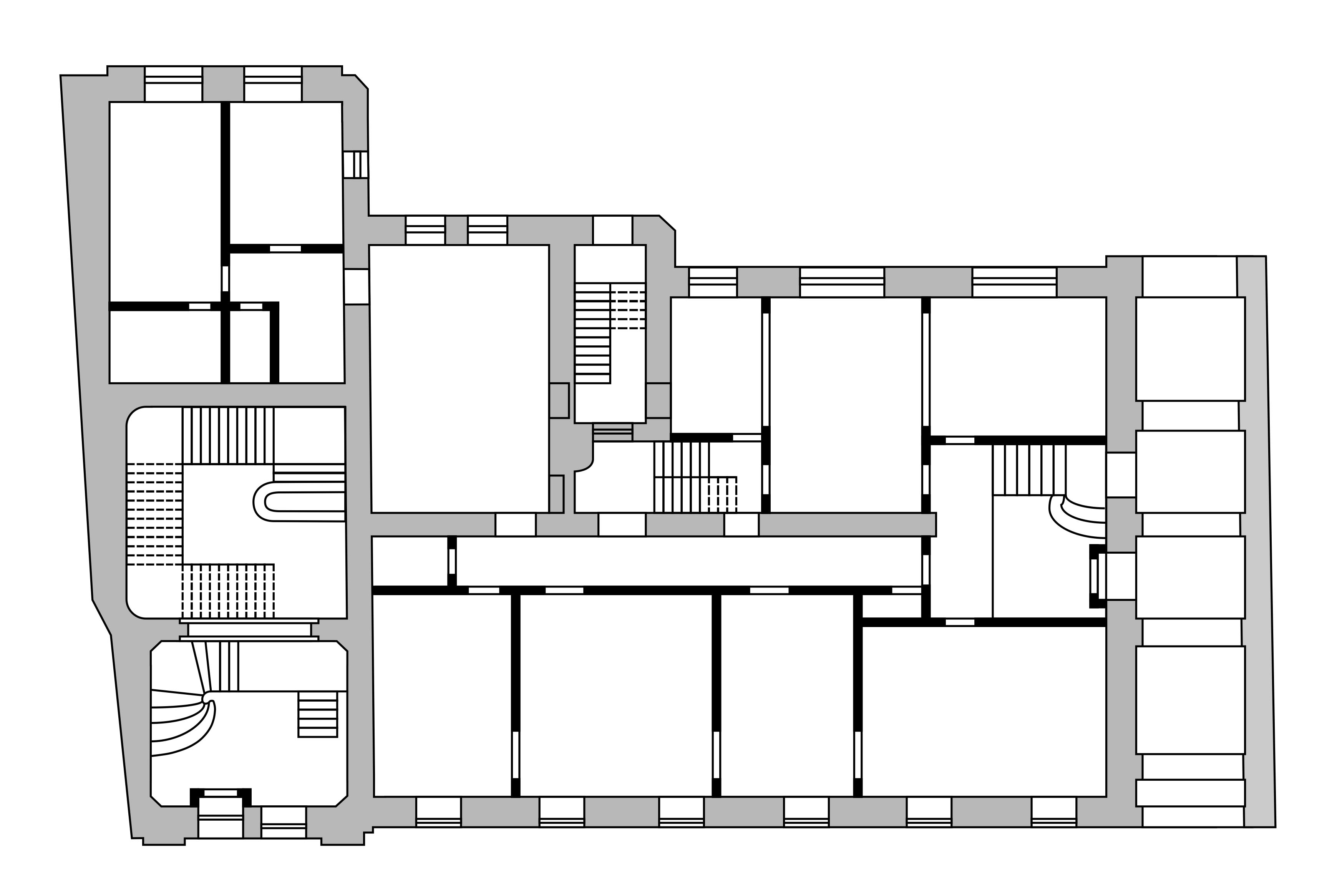 План 1 этажа особняка М. С. Саарбекова на Поварской улице в Москве (на основе копии с чертежа Л. Н. Кекушева с дополнениями архитектора В. А. Властова)